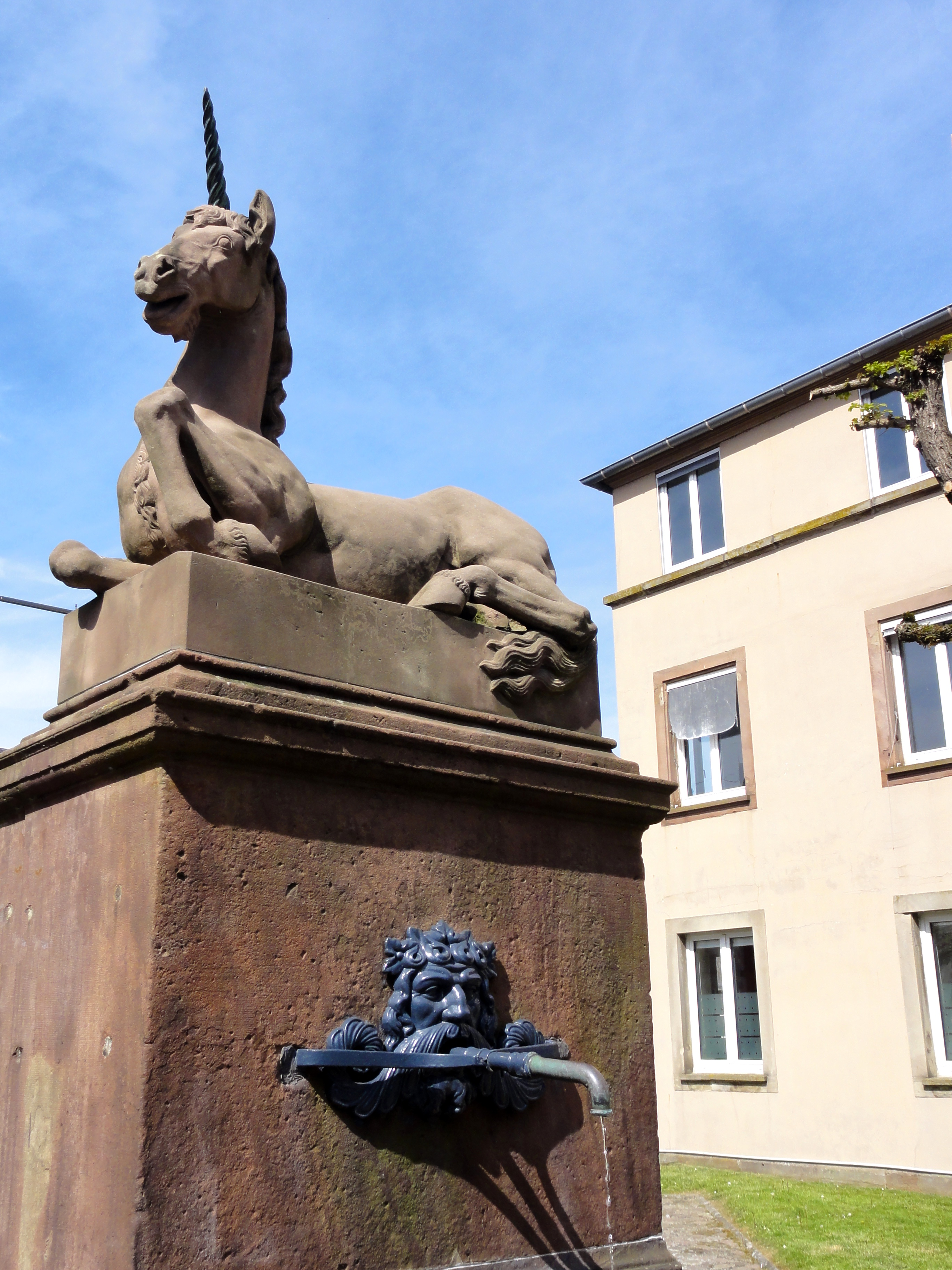 Alsace, Bas-Rhin, Saverne, Grand'Rue, Fontaine de la Licorne (1837)